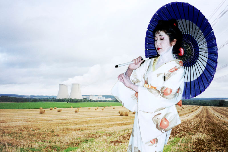 Photographie de l'artiste Kiki of Paris. Date de 1992. France et Kyoto. Exposition Zurich et Monaco Safra Art Invest 1997 et 1998.